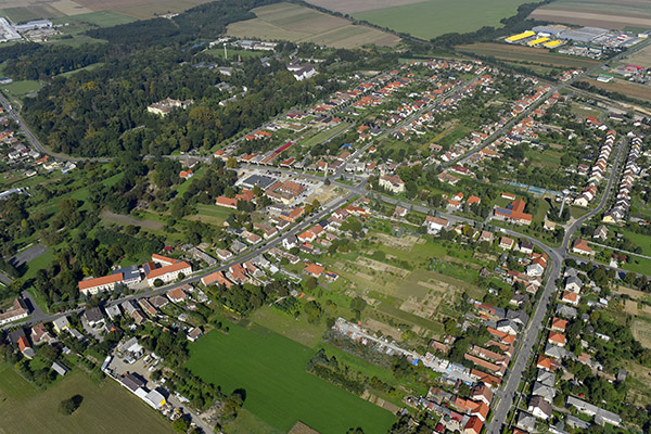 Vép város látképe madártávlatból